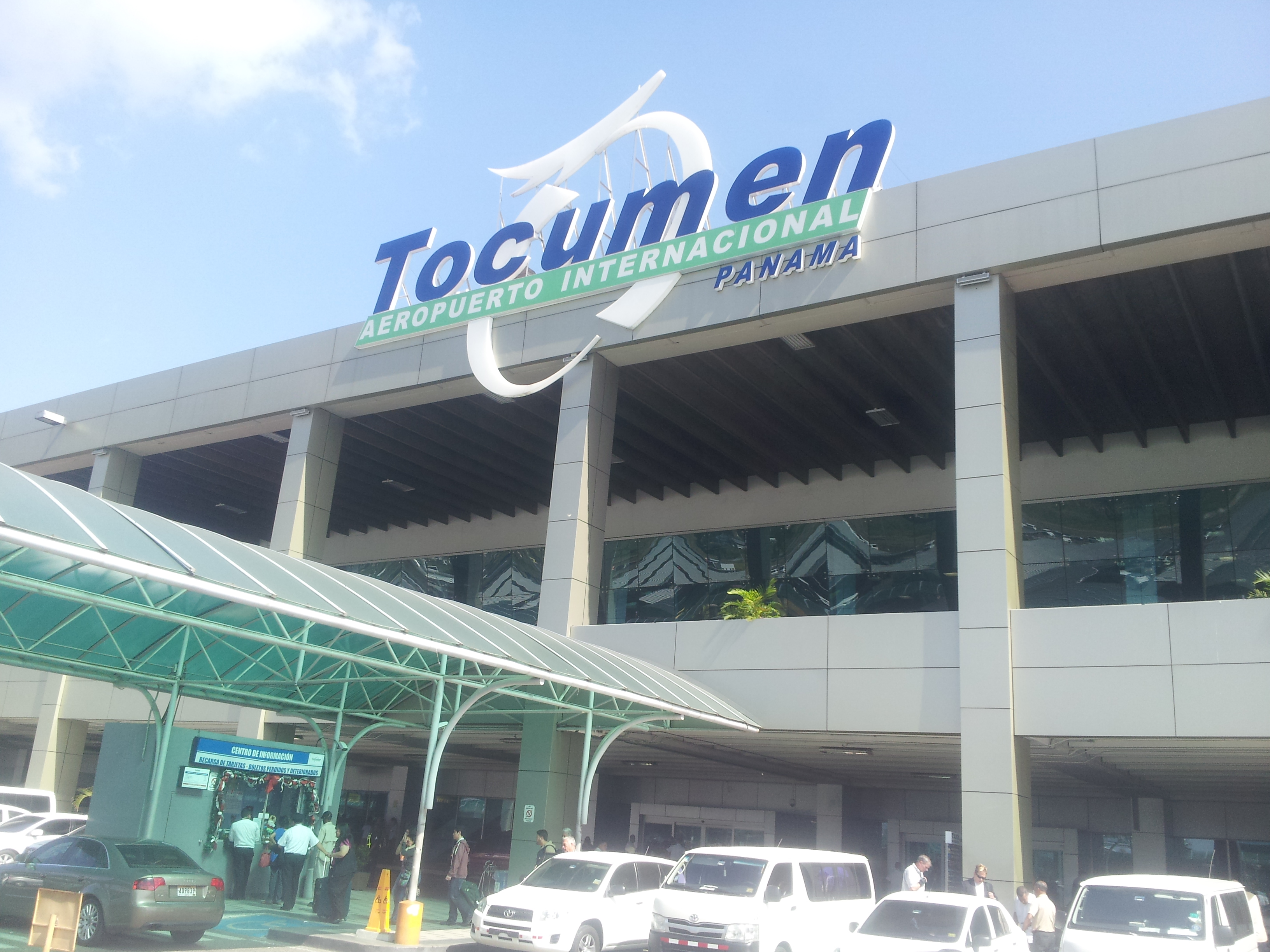 Entrada principal del Aeropuerto Internacional de Tocumen, ubicado en el corregimiento de Tocumen, distrito de Panamá.